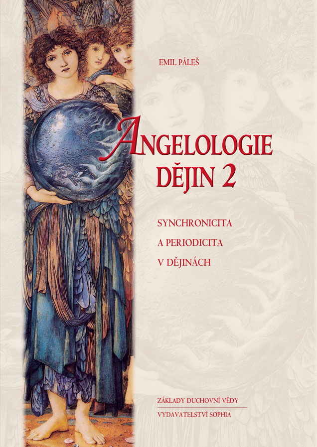 Přebal druhého svazku Angelologie dějin. Synchronicita a periodicita v dějinách. České vydání. 2012.